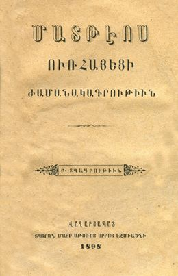 Обложка издания "Хроники" Матеоса Урхаеци 1898 года